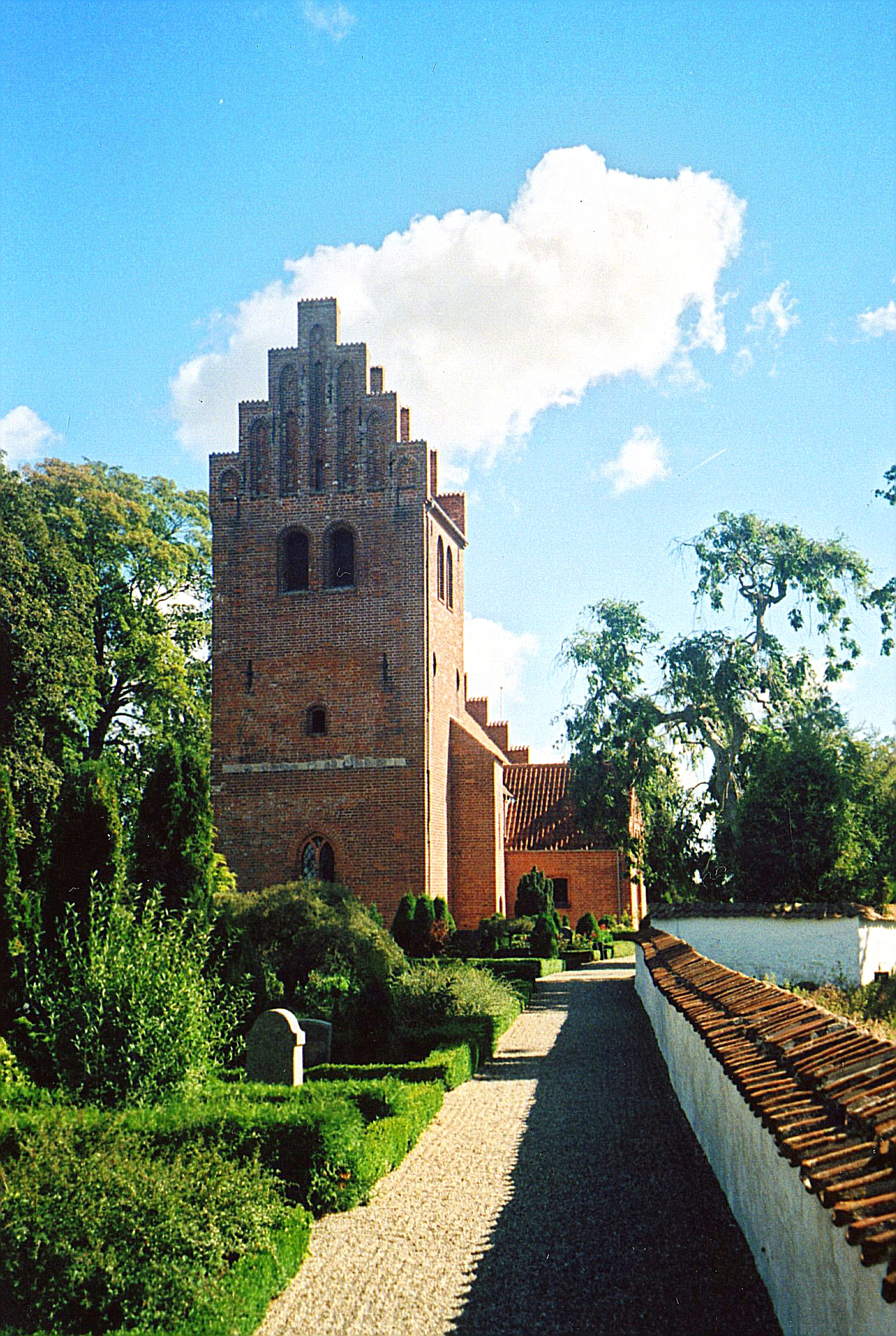 Øde Førslev Kirke, Øde Førslev Sogn, Faxe Kommune